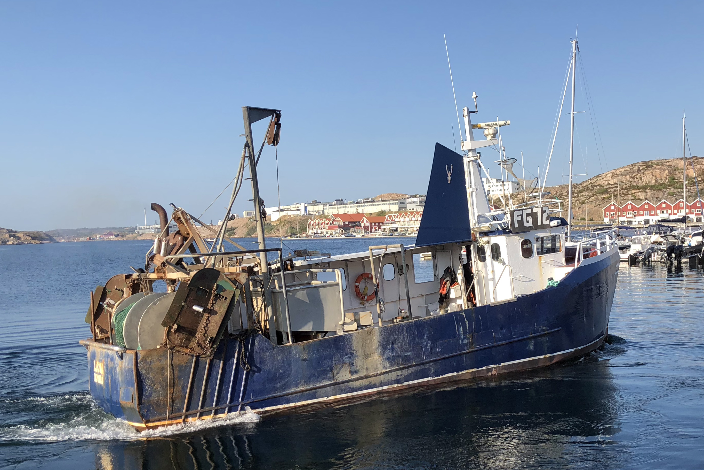 FG72 Lagun i Hasselösunds hamn